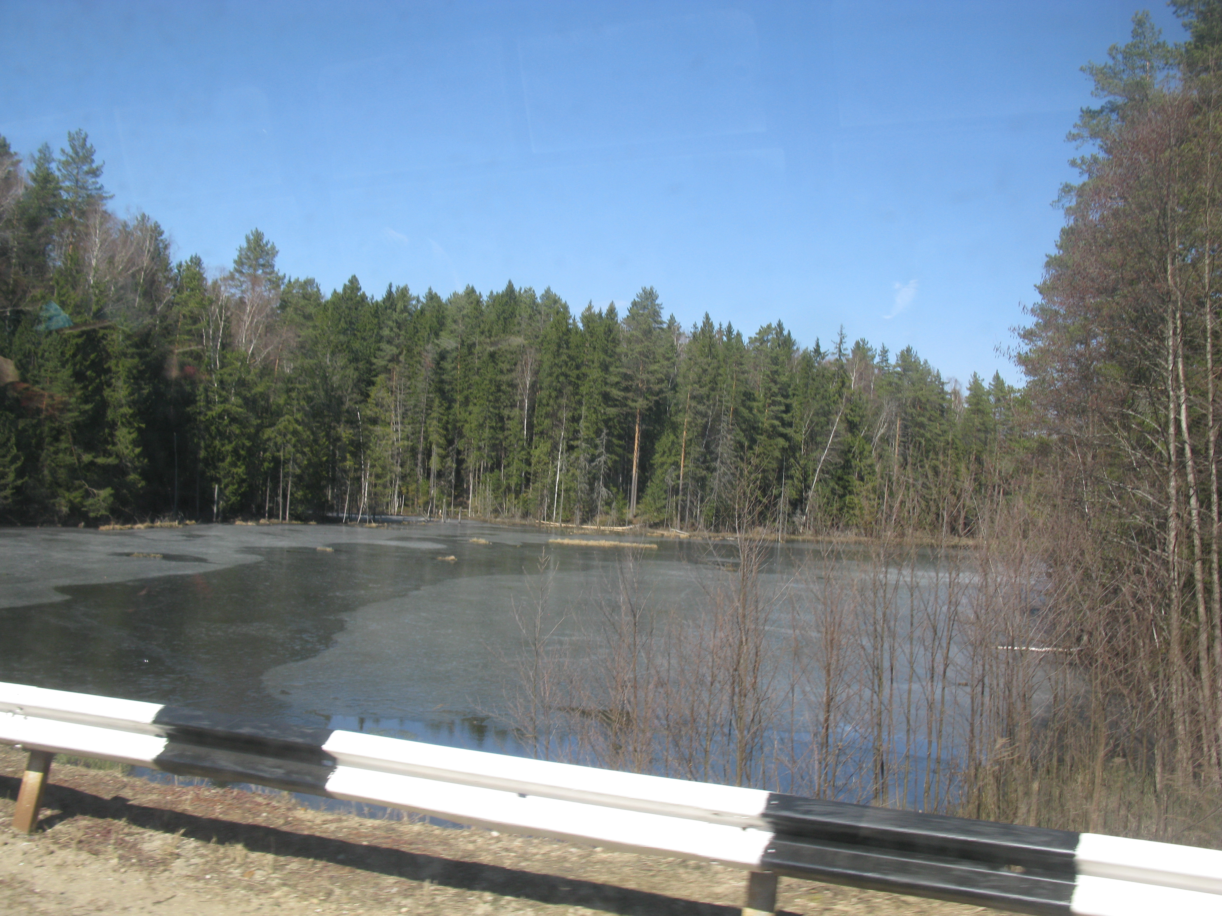 Река Лутовня (приток Жиздры)